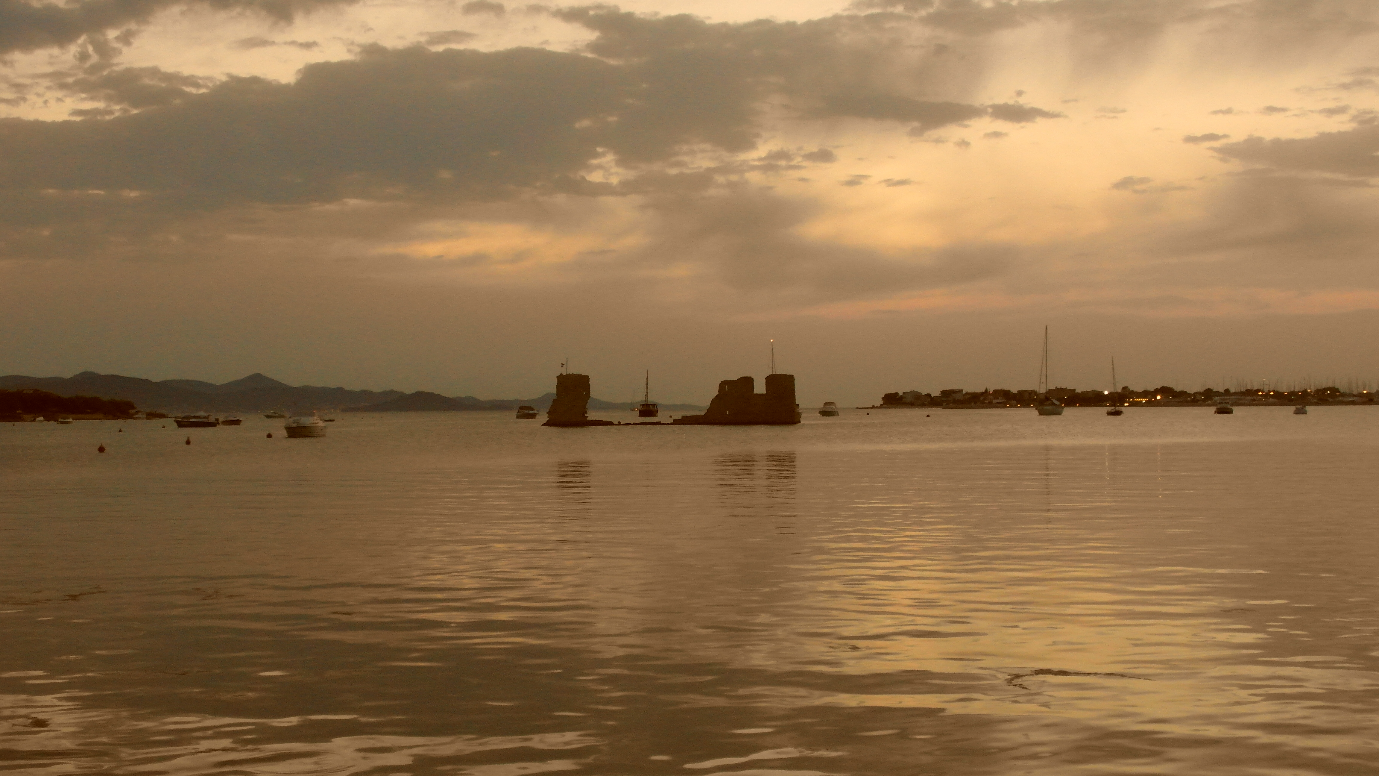 ZRÚCANINA VO VODE - RUINS IN WATER